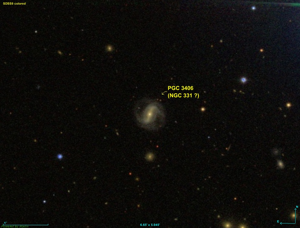 Image créée à l'aide du logiciel Aladin Sky Atlas du Centre de Données astronomiques de Strasbourg et des données de SDSS (Sloan Digital Sky Survey).